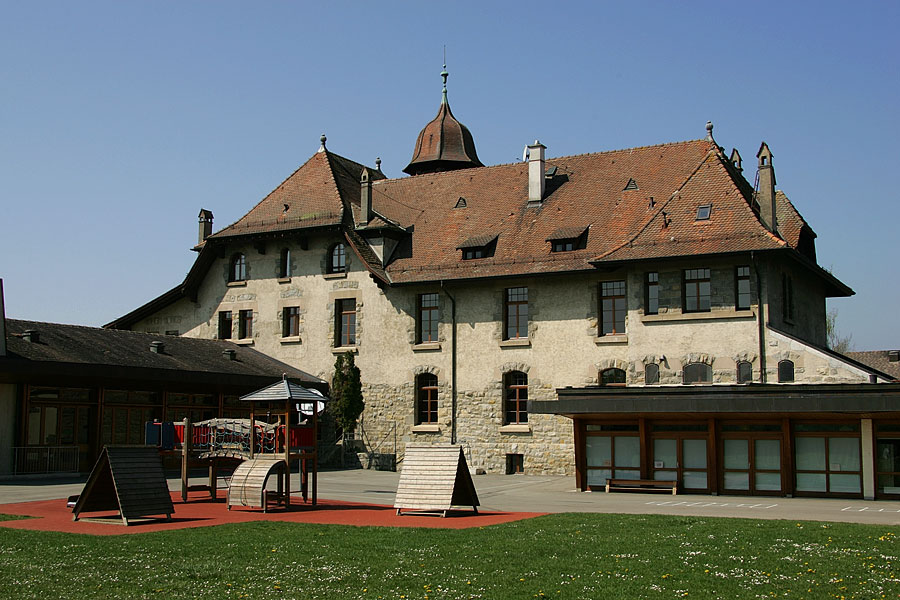 Primarschulhaus in Collonge